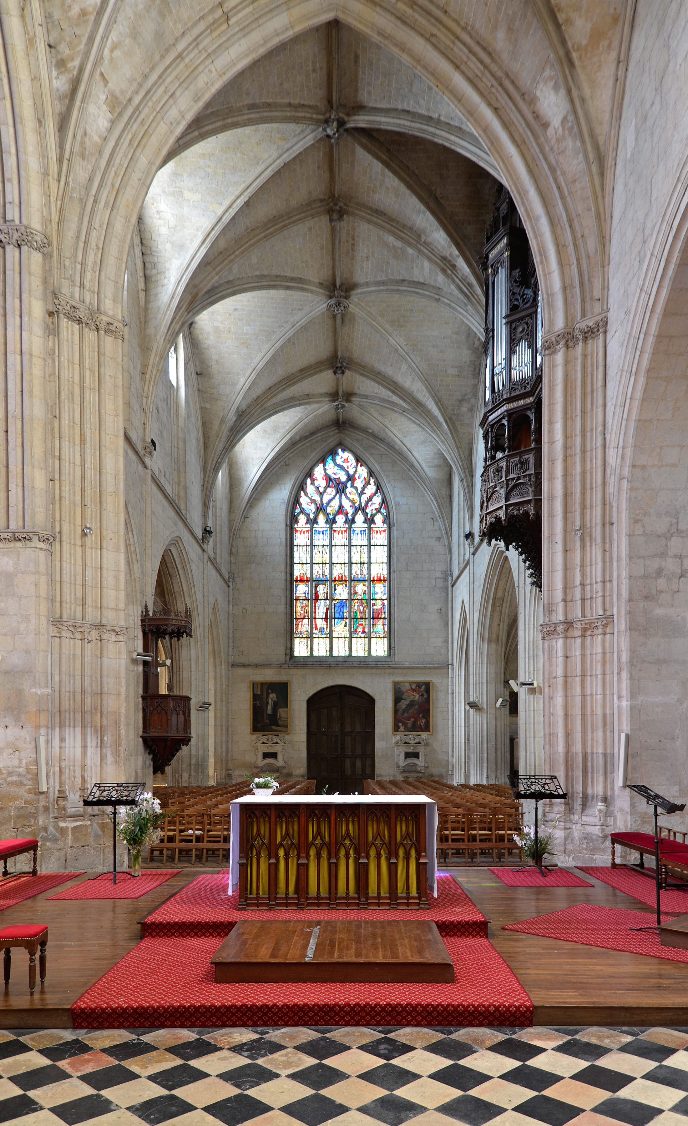 Église Notre-Dame-des-Marais de La Ferté-Bernard - Sarthe .